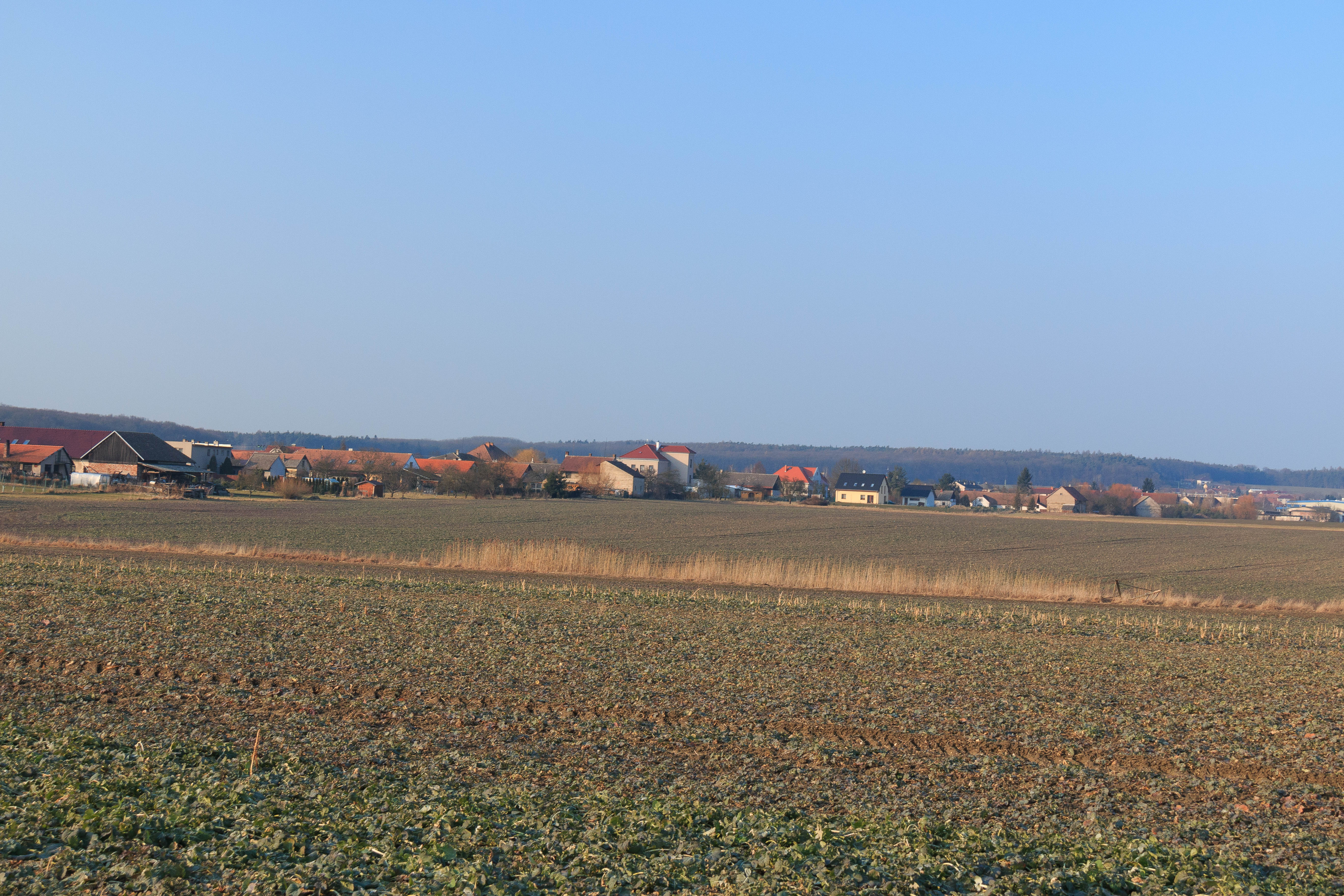 Pohled na Sopřeč